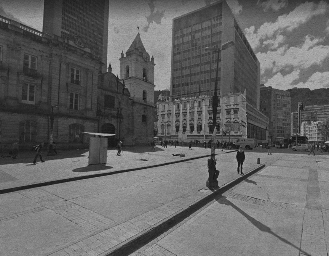 Instalación de obra artística en el edificio Banco de la República